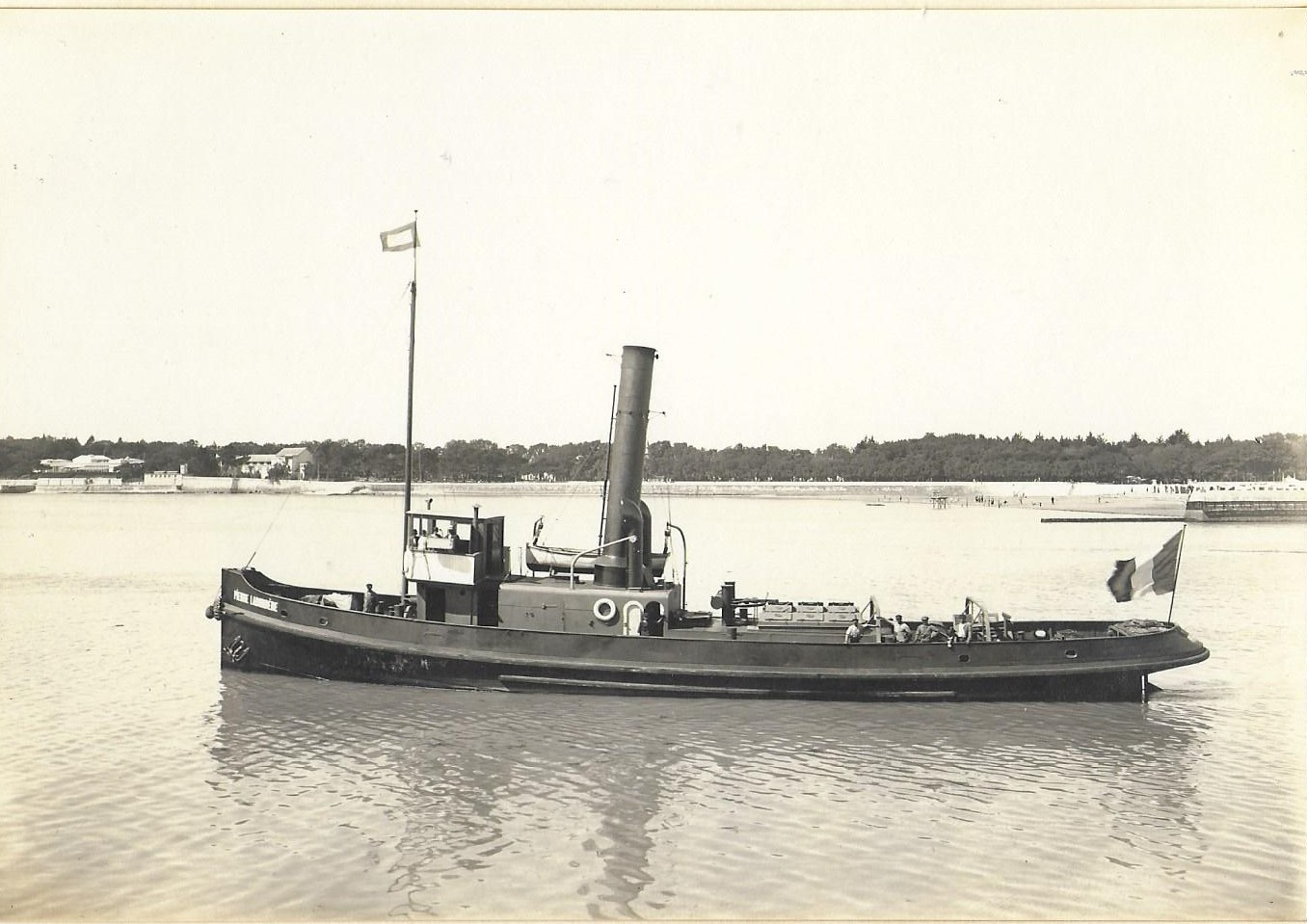 Remorqueur Pierre Labordère mouillé